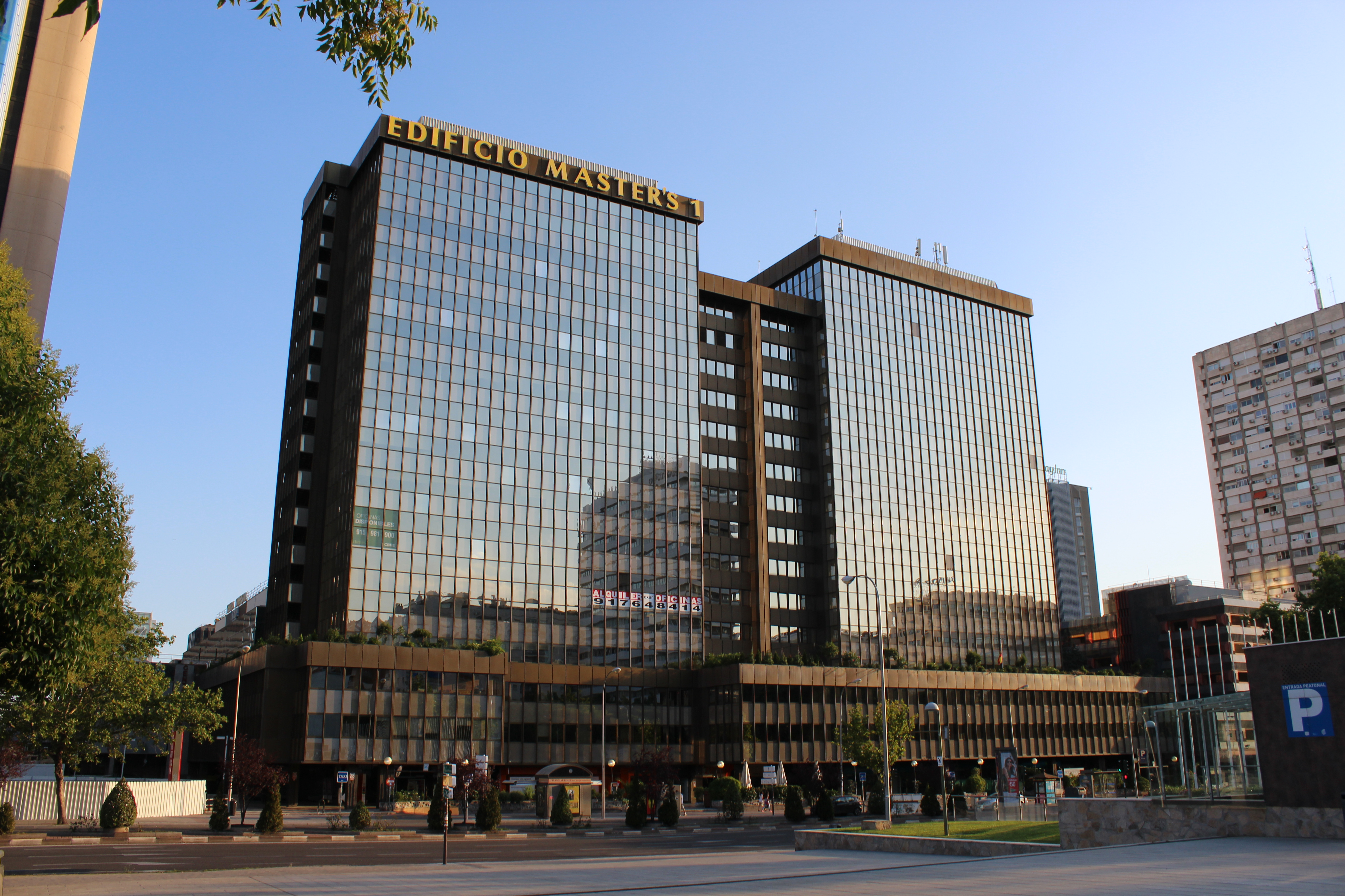 Calle de Leizarán, MadridTemplate:Retoched